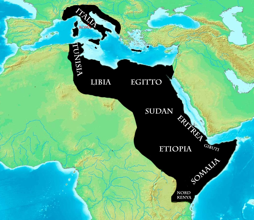 I territori dell'impero italiano secono i piani del governo fascista